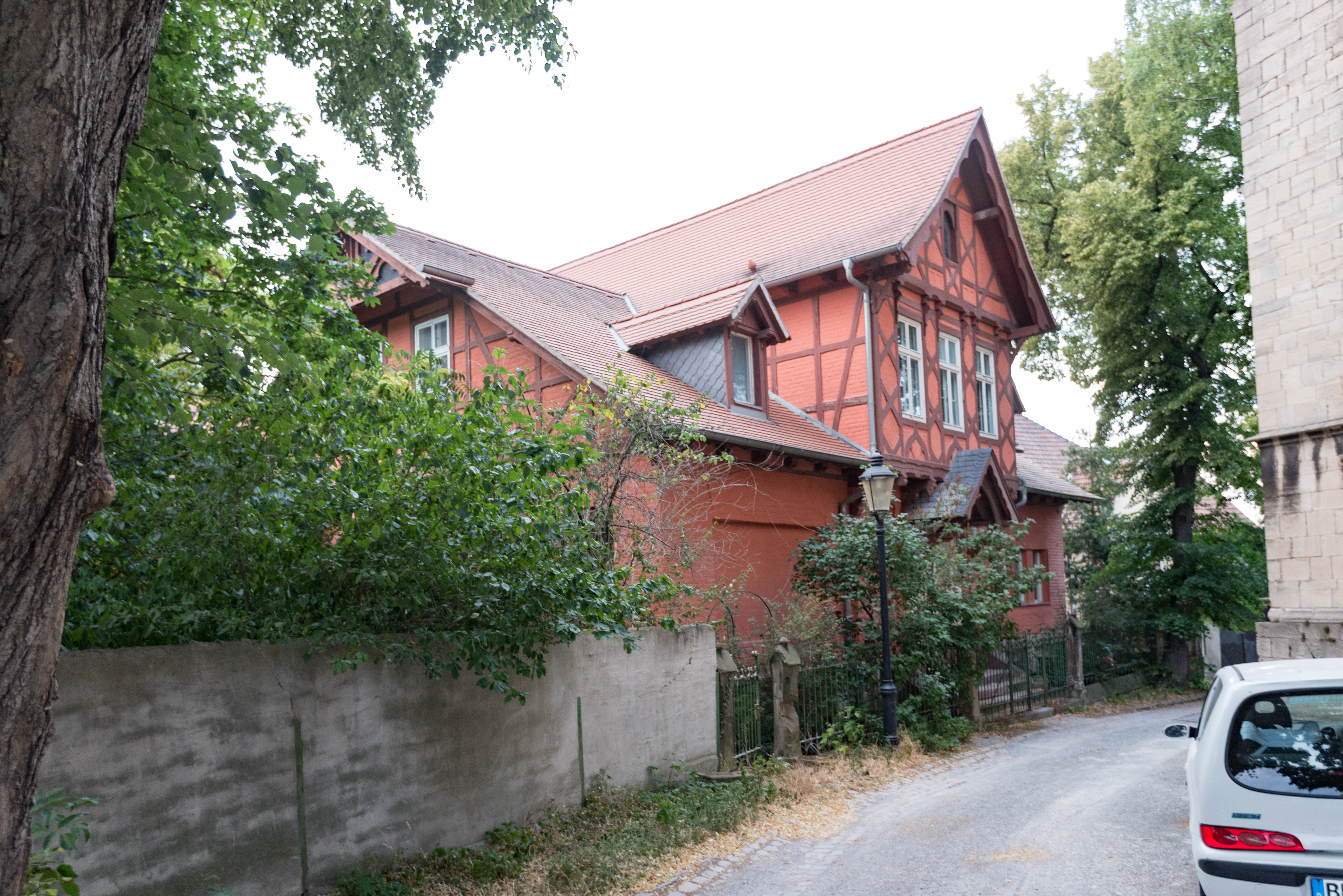 Naumburg (Saale), Moritzberg 26